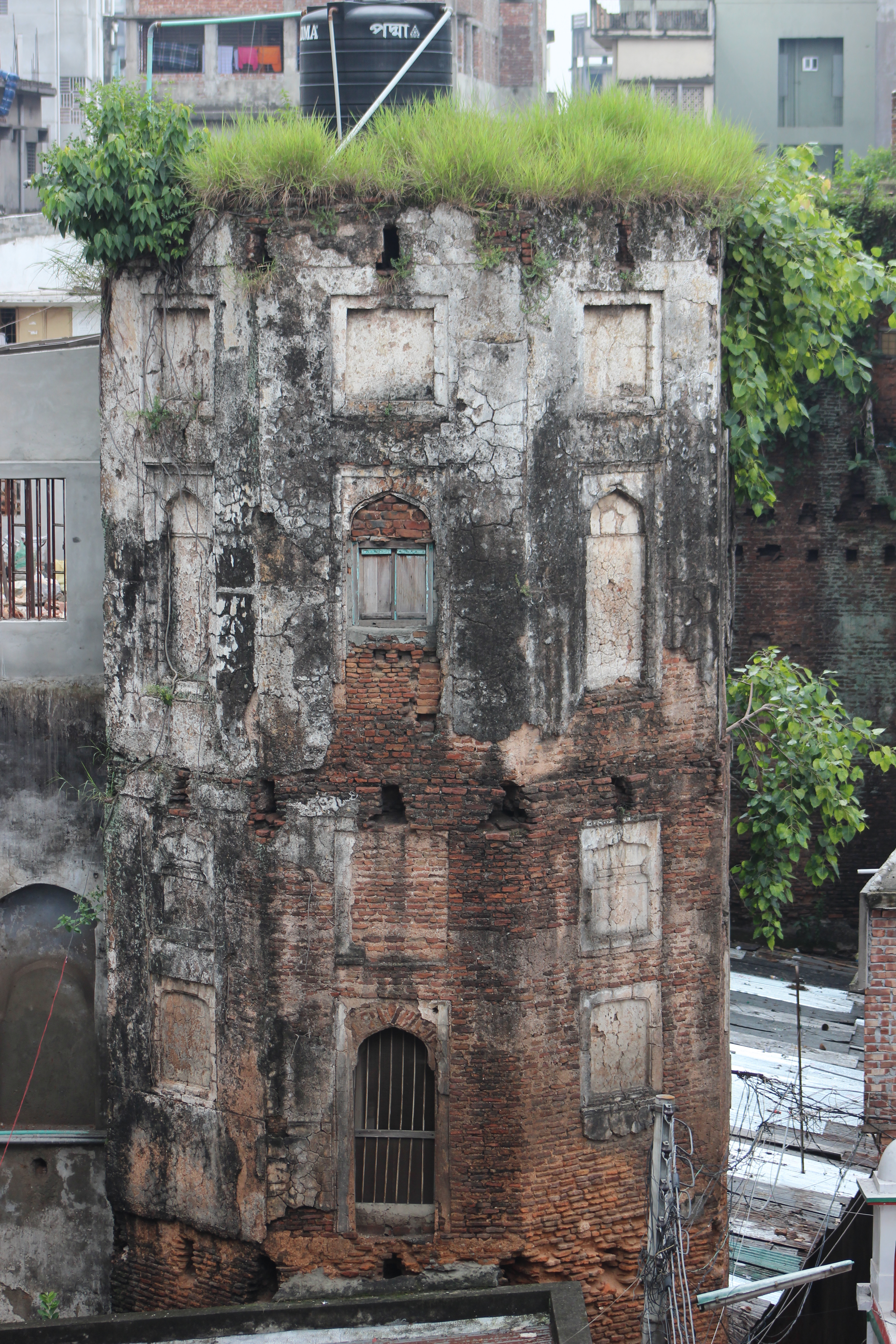 ছোট কাটরা